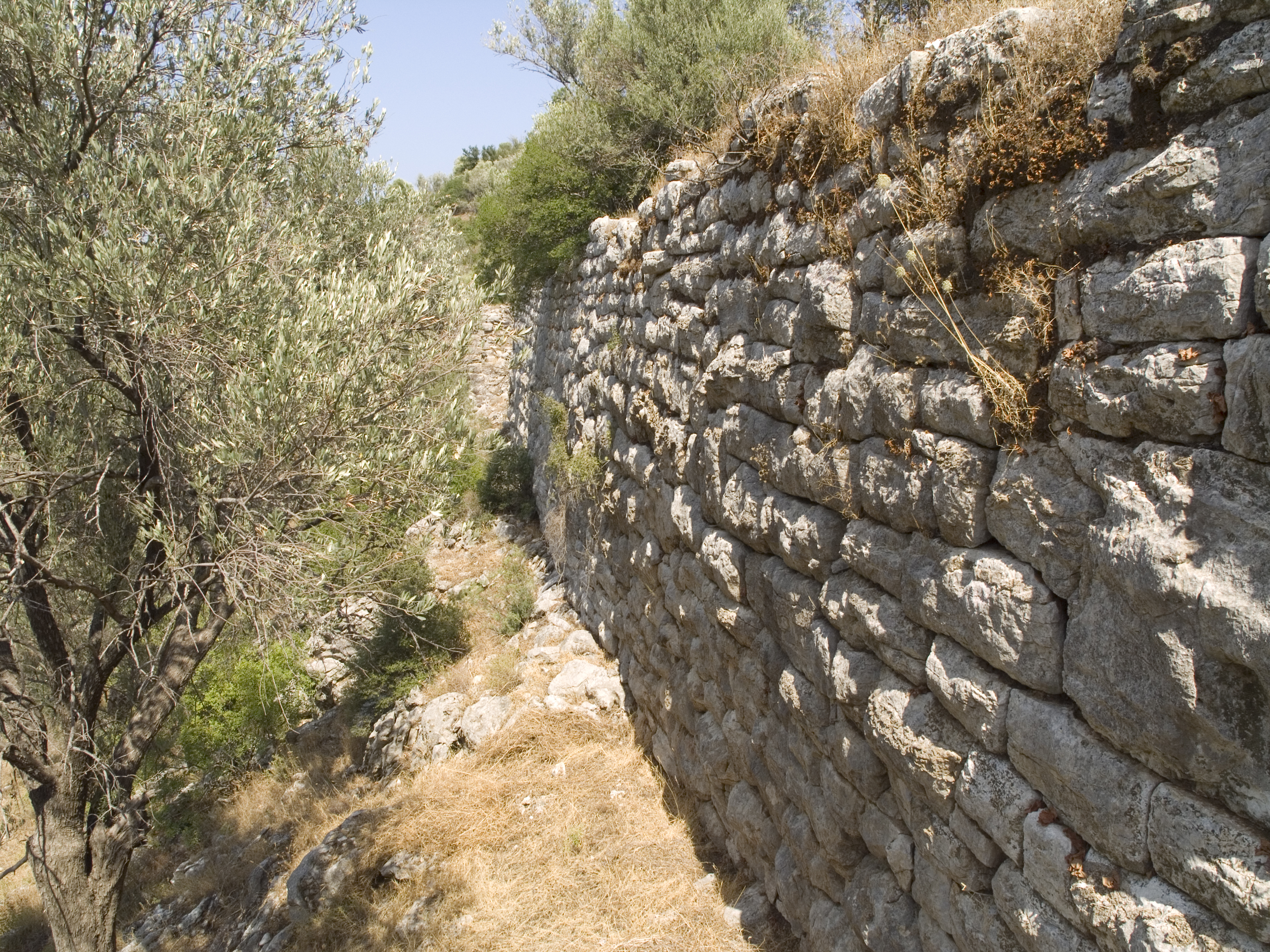 Турция – древний город Амос